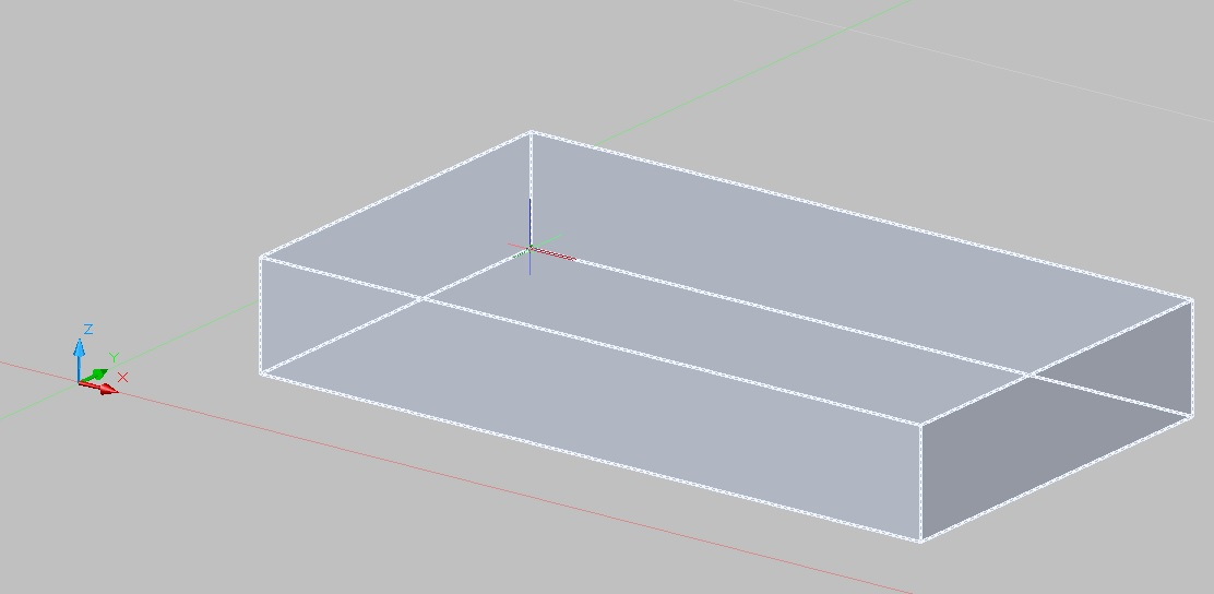 চিত্রঃ উদাহারণস্বরুপ আয়তাকার বস্তুটির ক্ষেত্রে X - অক্ষ বরাবর পরিমাপকে বলে দৈর্ঘ্য, Y - অক্ষ বরাবর পরিমাপকে বলে প্রস্থ এবং Z - বরাবর পরিমাপকে বলা হয় উচ্চতা।